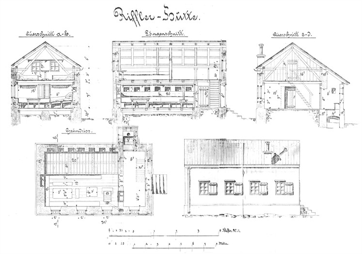 Entwurfszeichnung der Rifflerhütte von 1887